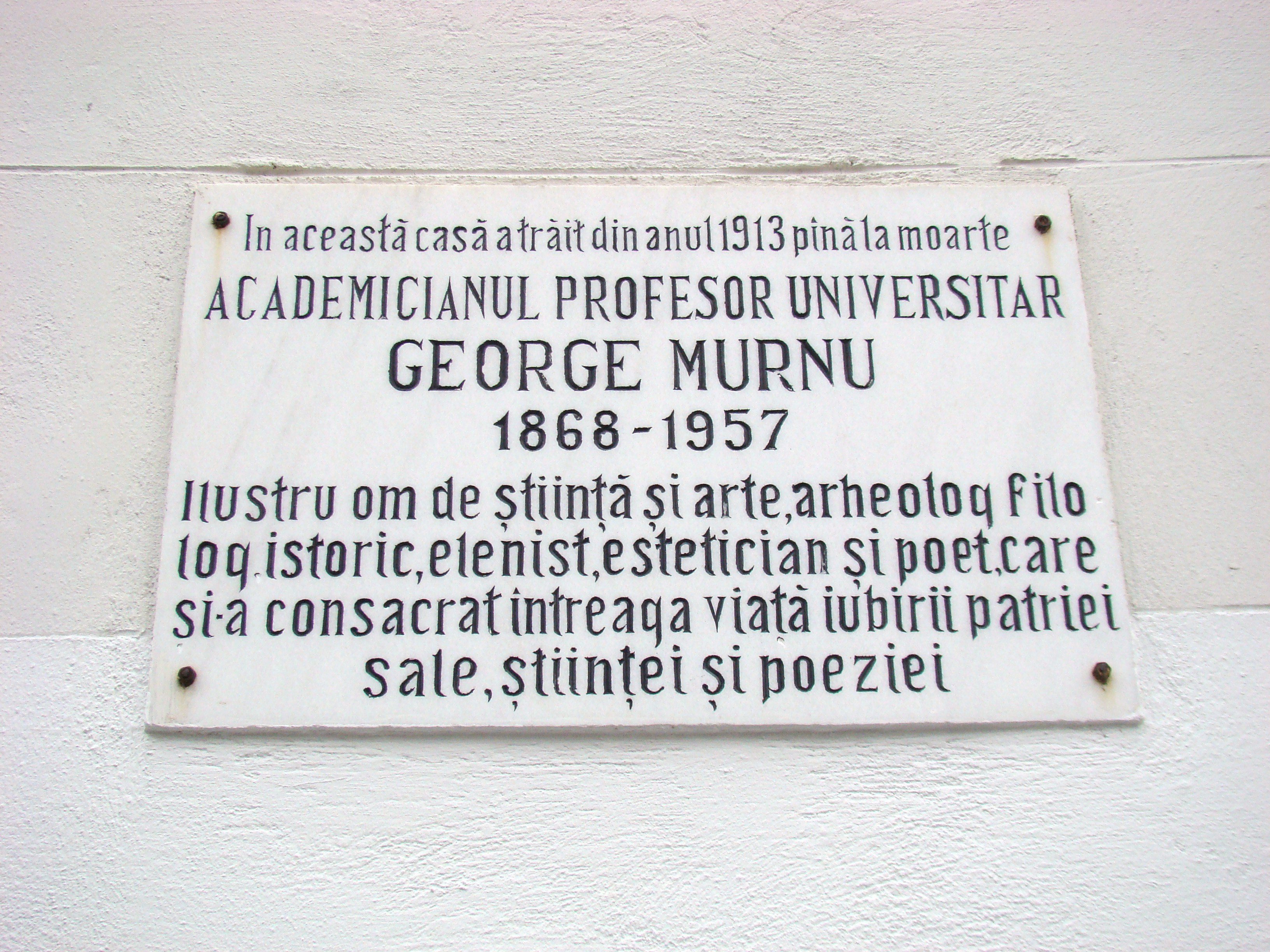 Casa George Murnu